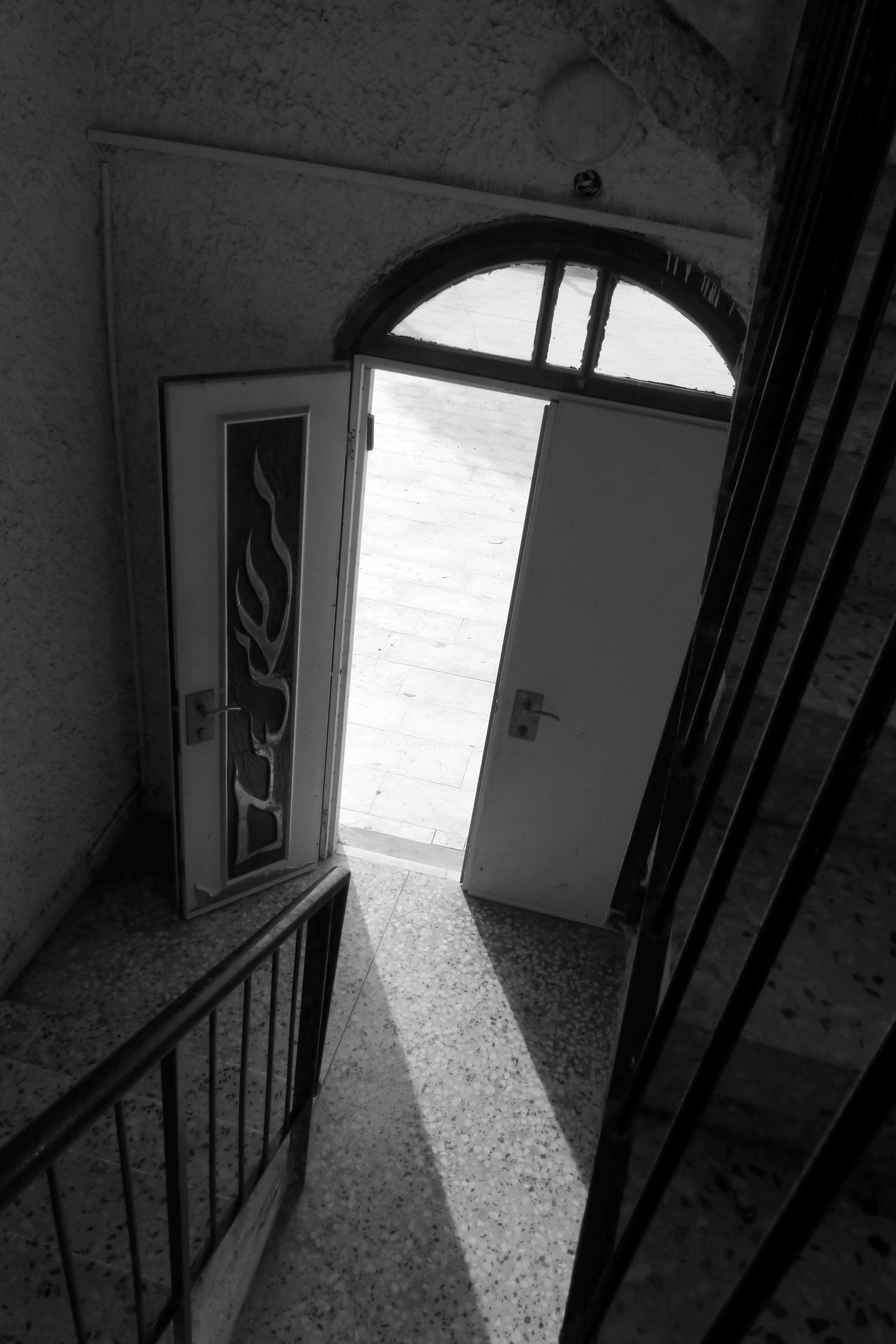 נוסד על ידי ראובן לרר ושימש בעבר כבית ספר, בית כנסת, בית ההגנה והיה המרכז הקהילתי הראשון למושבה נס ציונה. כיום משמש כמוזיאון בית ראשונים.